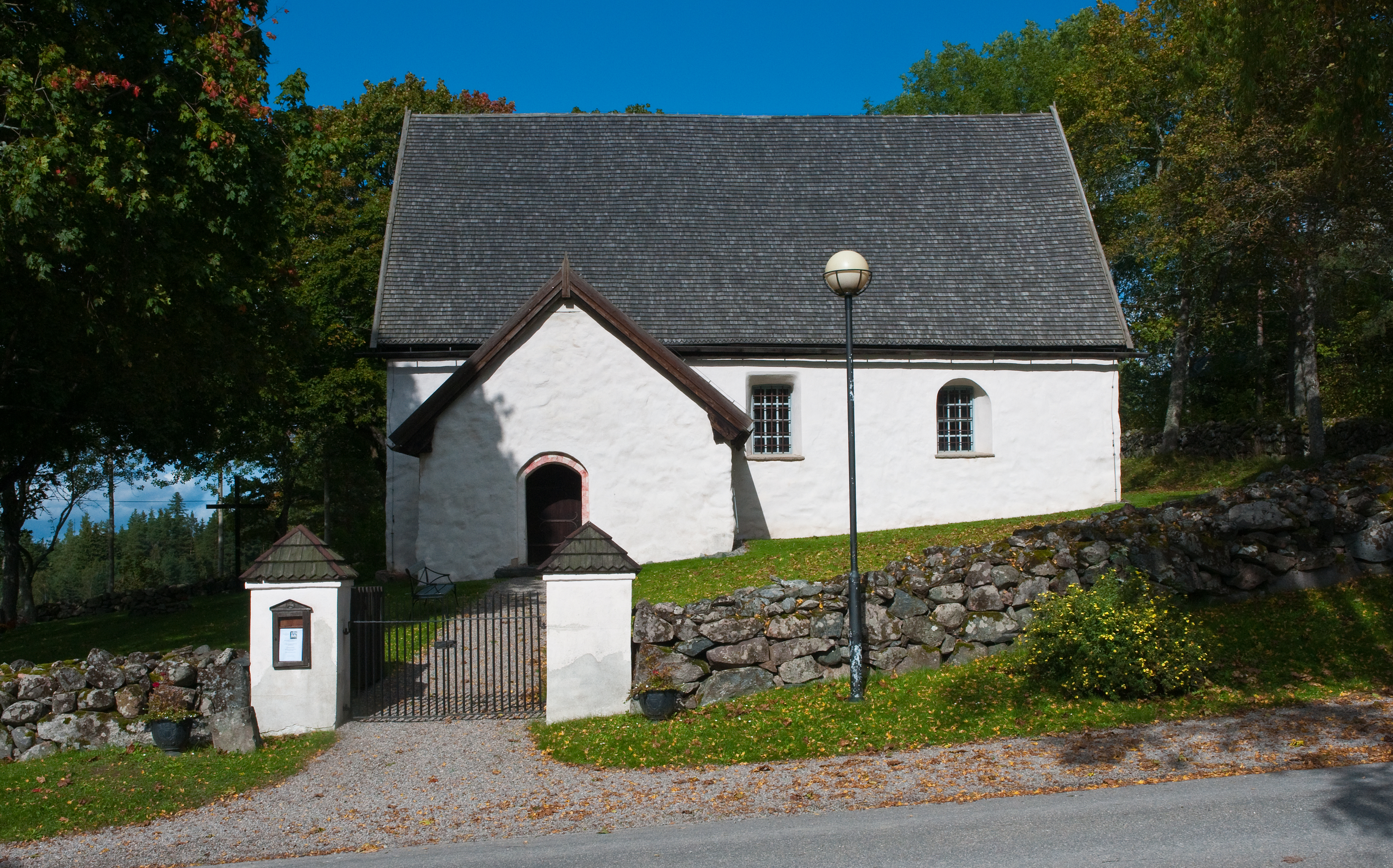 Spelviks kyrka i Nyköpings kommun